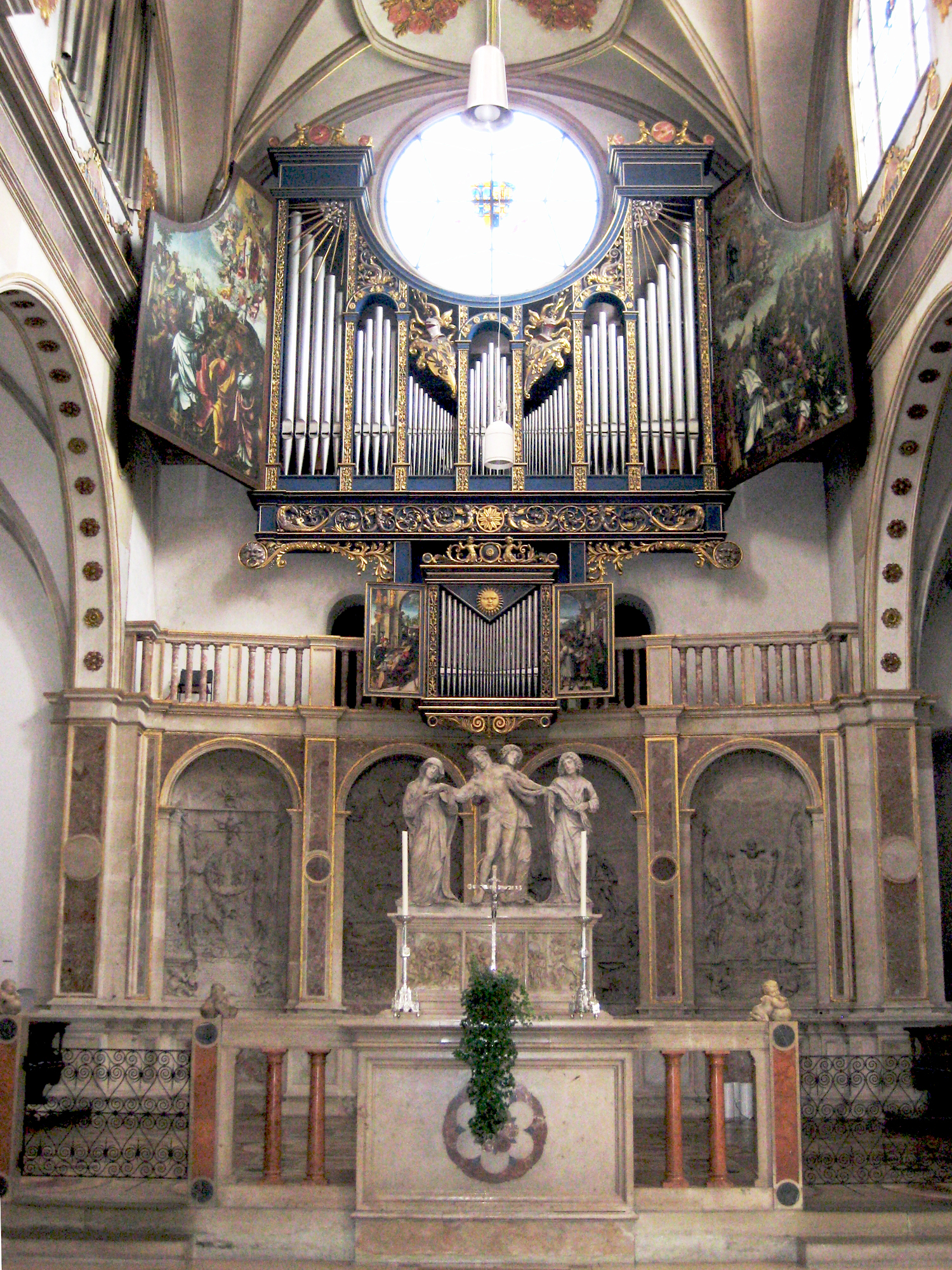 Hauptaltar der St.-Anna-Kirche Augsburg; zentrale Fronleichnamsgruppe/Beweinungsgruppe, die Putti auf der Marmorbalustrade vor der Kapelle und die Chorgestühlbüsten von Hans Daucher (1486–1538) Alternative names Hans Dauher; Hans DauerDescriptionGerman sculptorDate of birth/death circa 1486 date QS:P,+1486-00-00T00:00:00Z/9,P1480,Q5727902 1538 Location of birth/death Ulm (?) StuttgartAuthority control : Q1579104 VIAF: 13101262 ISNI: 0000 0000 8092 8044 ULAN: 500008634 LCCN: nr97009173 WGA: DAUCHER, Hans WorldCat creator QS:P170,Q1579104 -- Fugger Kapelle am westlichen Ende der Anna-Kirche